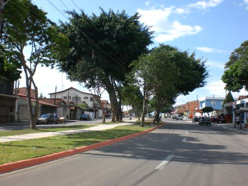 Avenida Artur Antônio dos Santos, a 2ºprincipal avenida do bairro Cidade Morumbi.